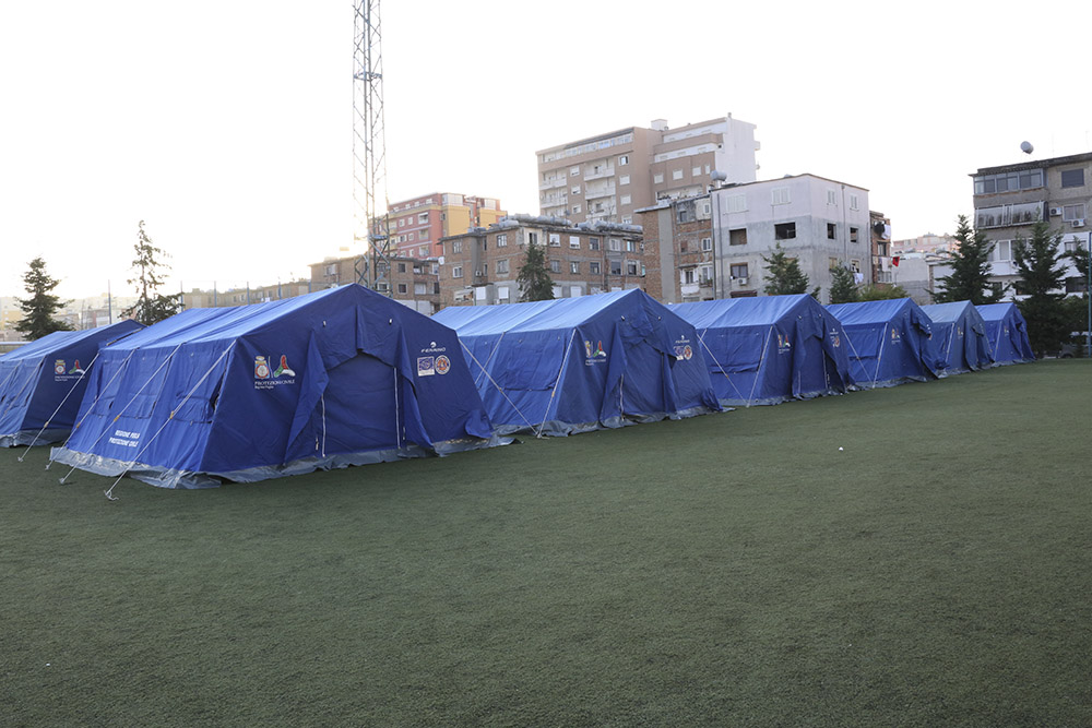 Durazzo, 27 novembre 2019 – L'area di accoglienza allestita nel campo sportivo di Durazzo. Il Sistema Nazionale di Protezione Civile si è attivato, su disposizione del Presidente del Consiglio dei Ministri, nell’ambito del Meccanismo Europeo per rispondere alla richiesta di intervento pervenuta dalle autorità albanesi in seguito alla scossa di magnitudo 6.5 che il 26 novembre ha colpito il Paese. Sono al lavoro in Albania oltre duecento uomini tra team dei Vigili del Fuoco e squadre USAR di ricerca e soccorso, personale medico AREU della Regione Lombardia, volontari delle colonne mobili delle Regioni Puglia e Molise, unità cinofile dell’UCIS e della Guardia di Finanza, tecnici del Dipartimento della Protezione Civile.